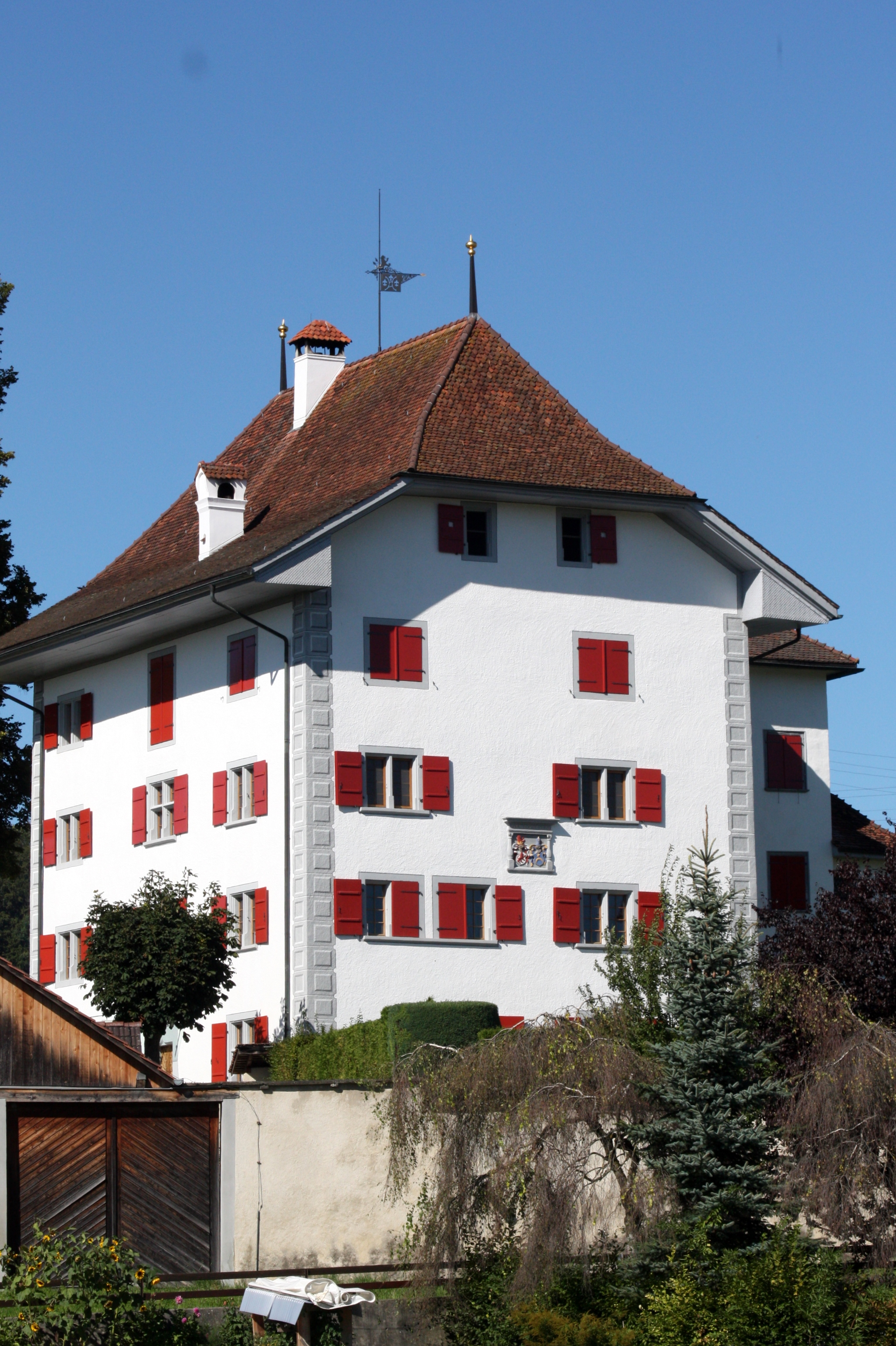 Schloss und Schlossgut, Buttisholz